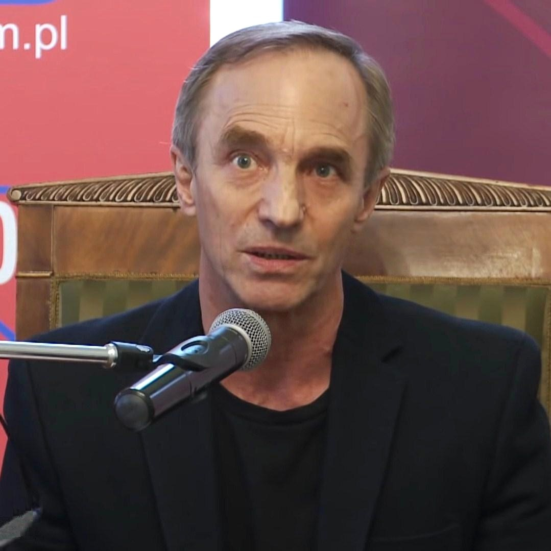 Prof. dr hab. Stanisław Obirek, teolog, historyk, antropolog kultury.